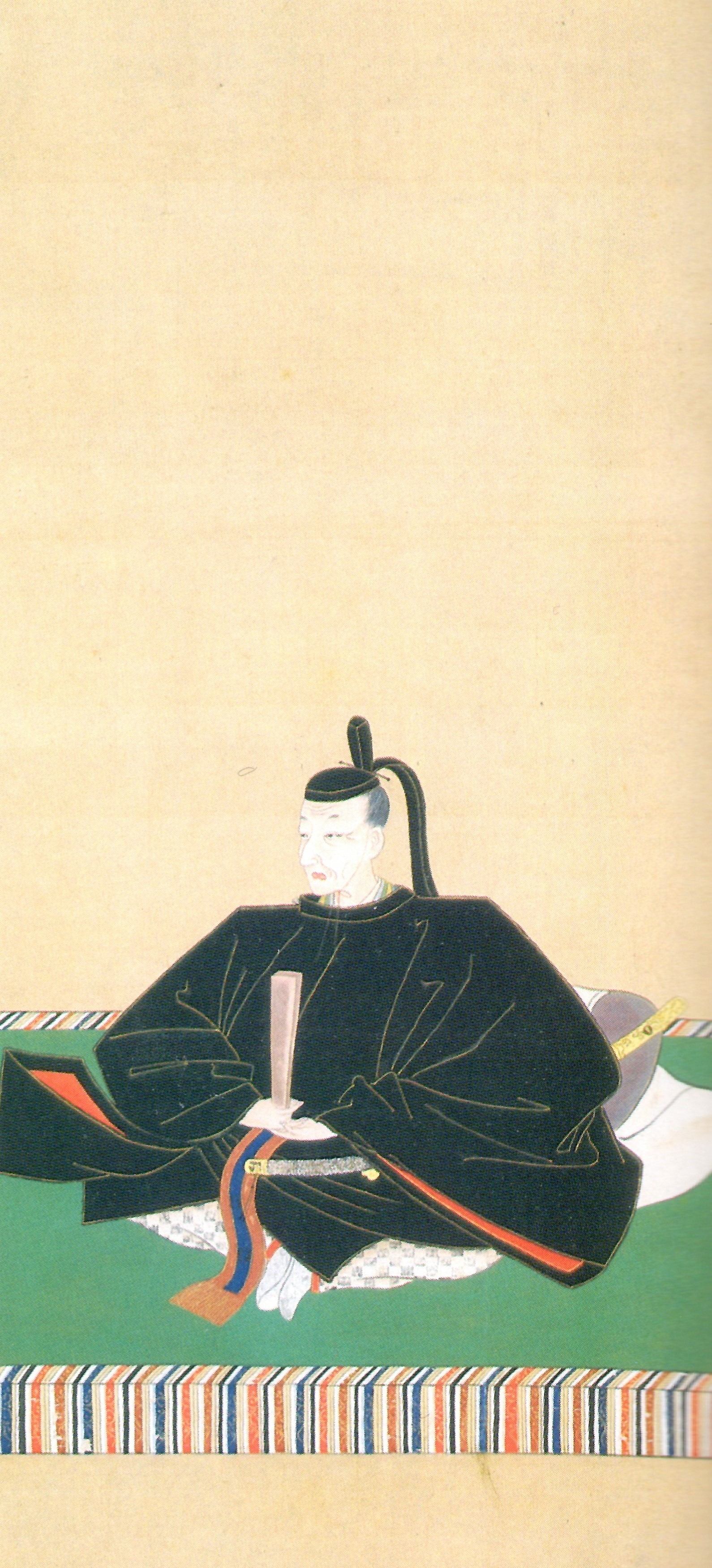 鍋島宗教の肖像。